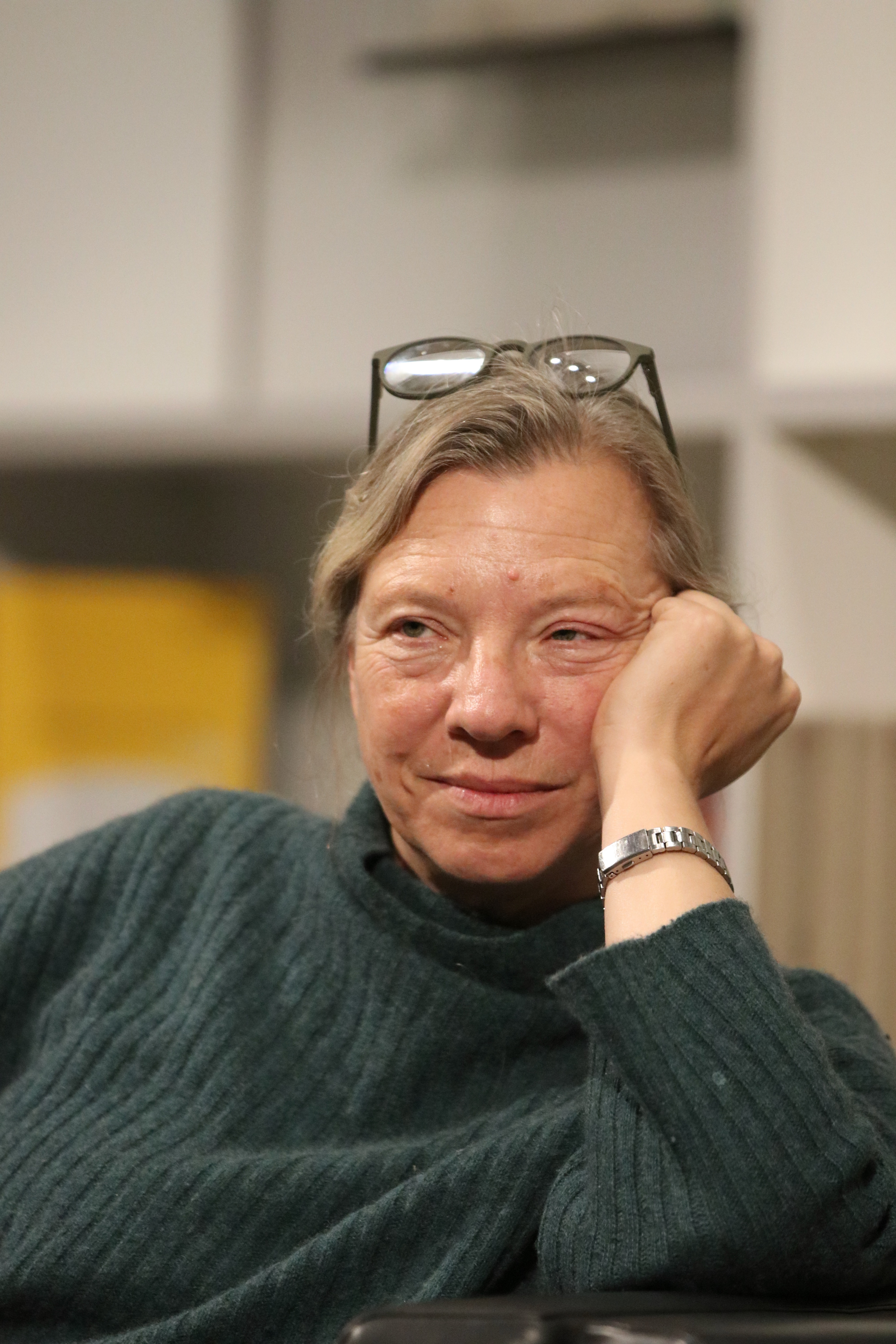 enriette Löwisch, Leiterin der Deutschen Journalistenschule, als Moderatorin einer Veranstaltung der Monacensia zum Thema "Anstand, Freiheit, Toleranz" - Öffentliche Debatte über die Ideale der Demokratie.